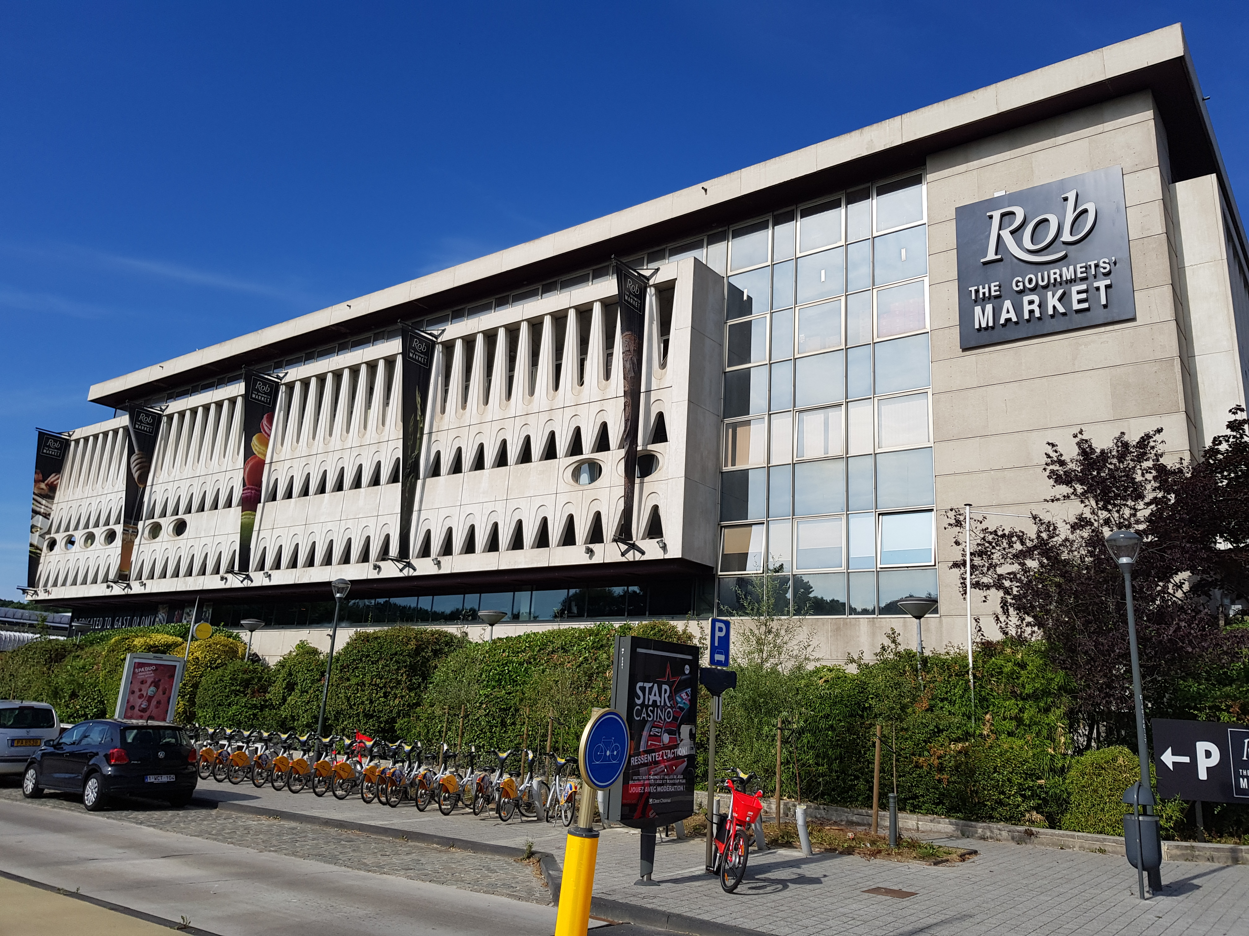 Rob, Woluwe-Saint-Pierre, Bruxelles, Belgique.